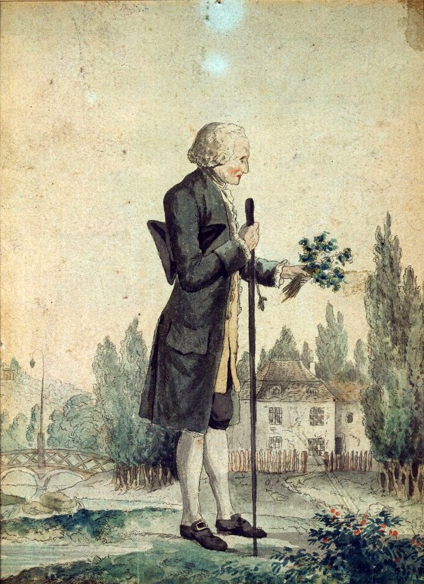 Portrait de Jean-Jacques Rousseau